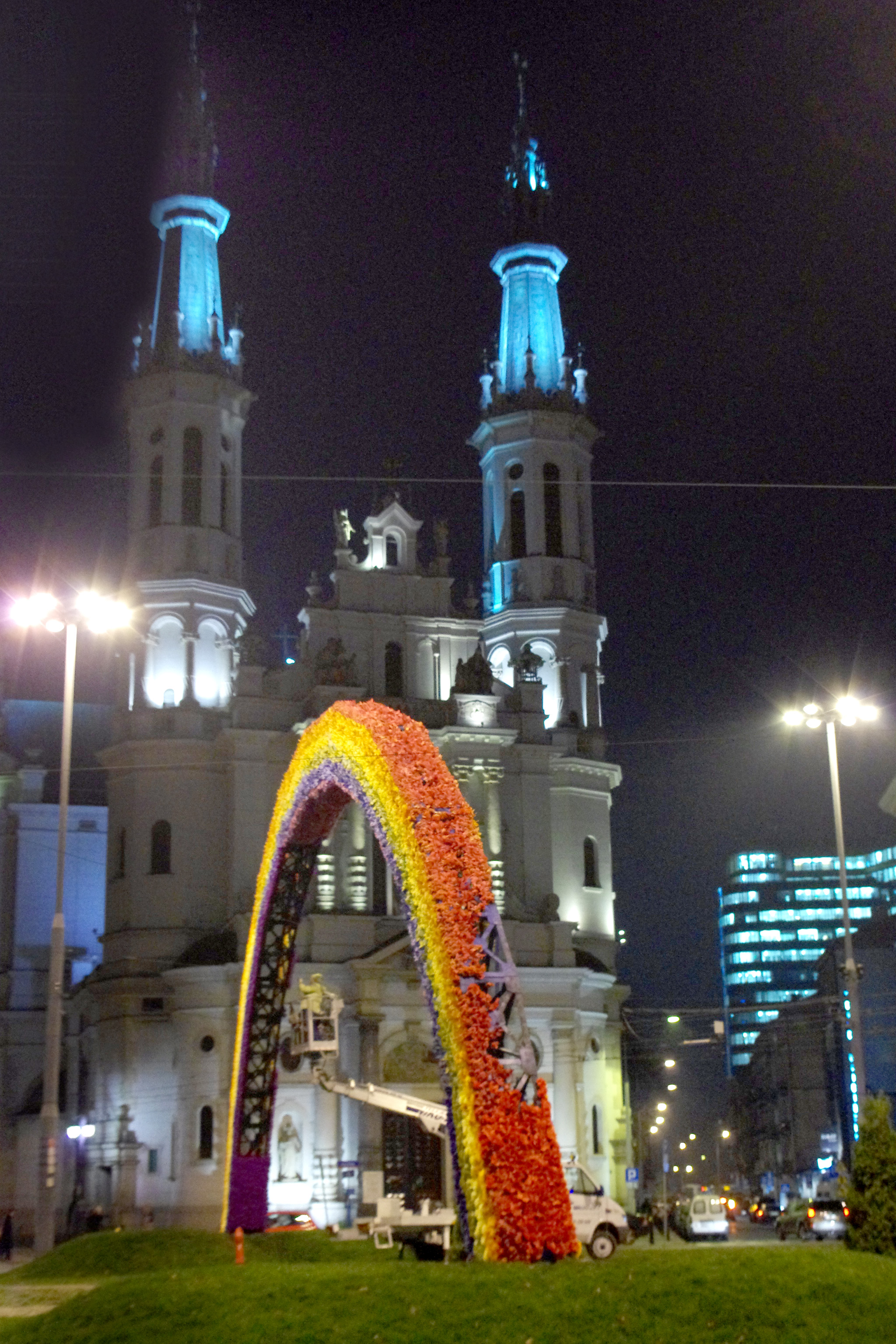 Remont tęczy na pl. Zbawiciela w Warszawie po próbie spalenia. W tle widoczny Kościół Najświętszego Zbawiciela.